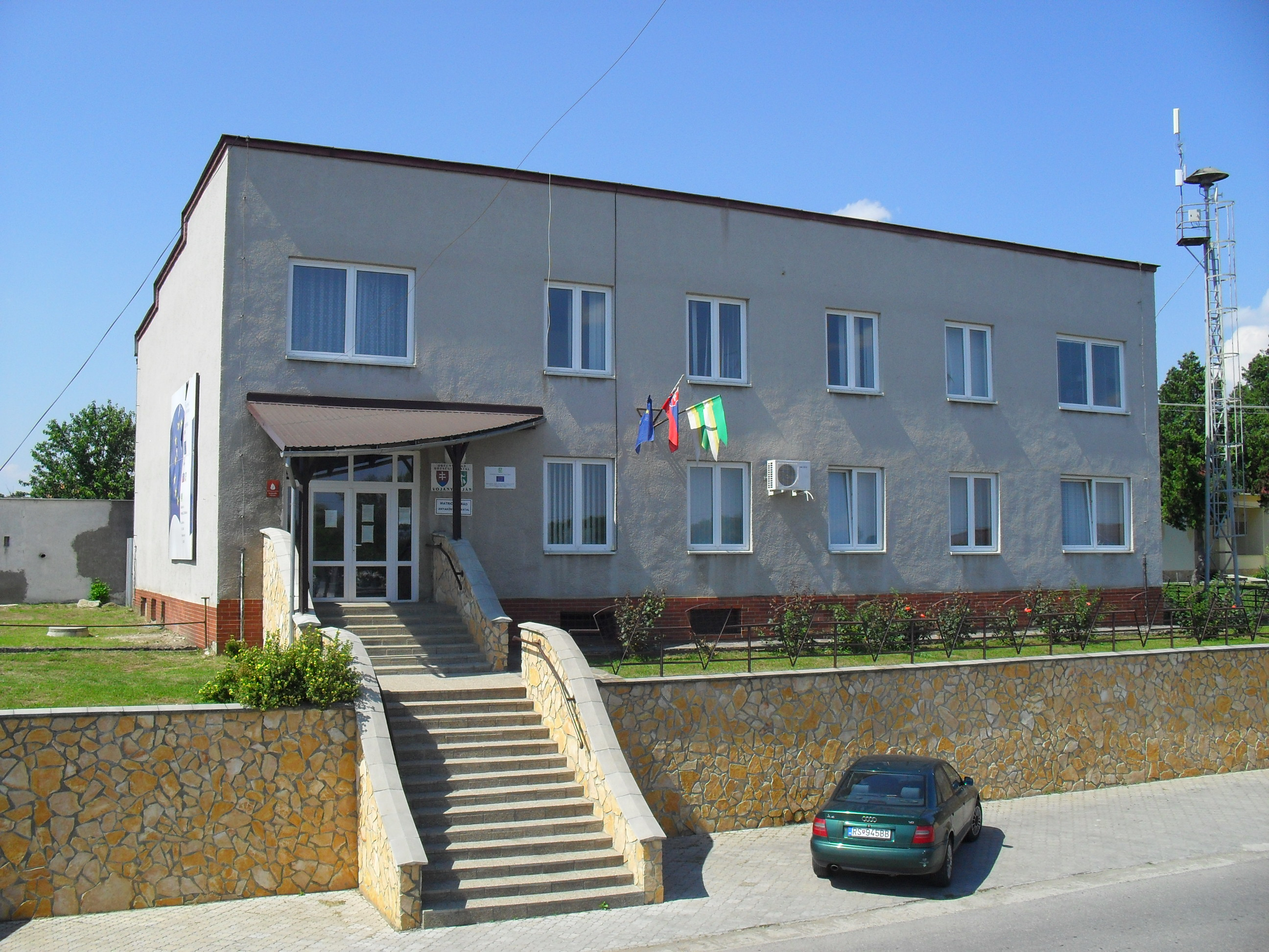 Vaján - községi hivatal